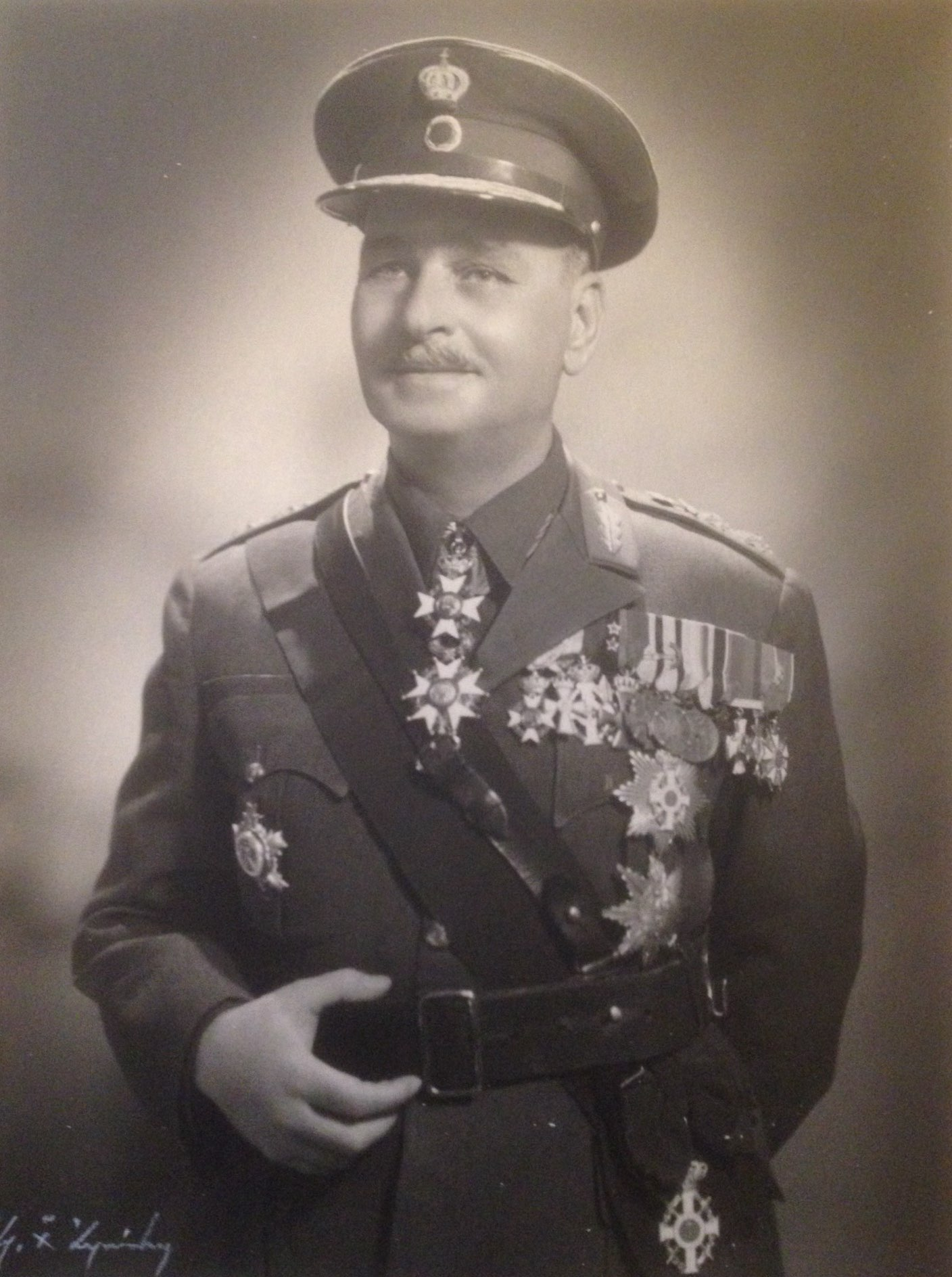 Aντιστράτηγος Στυλιανός Μανιδάκης